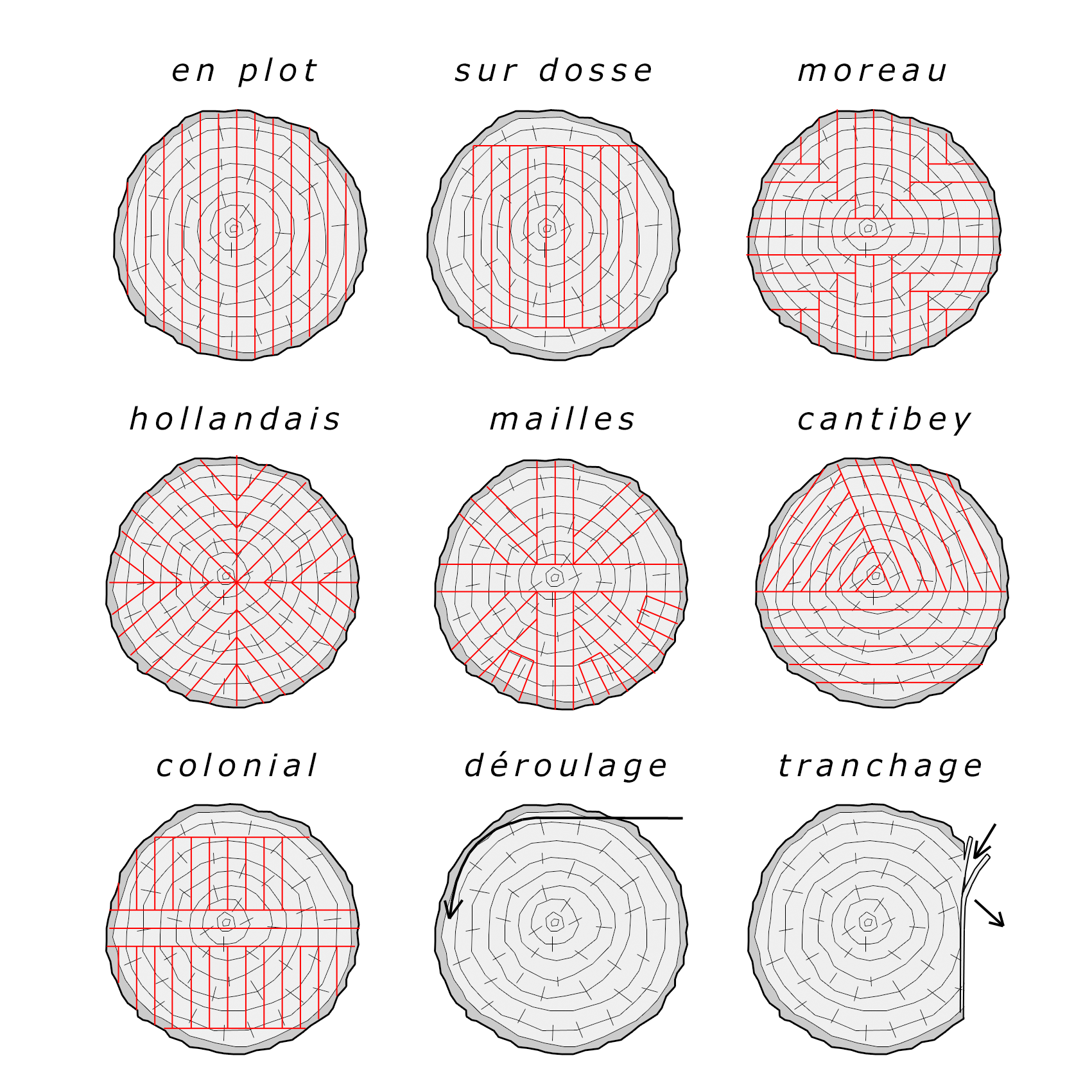 techniques de débit du bois